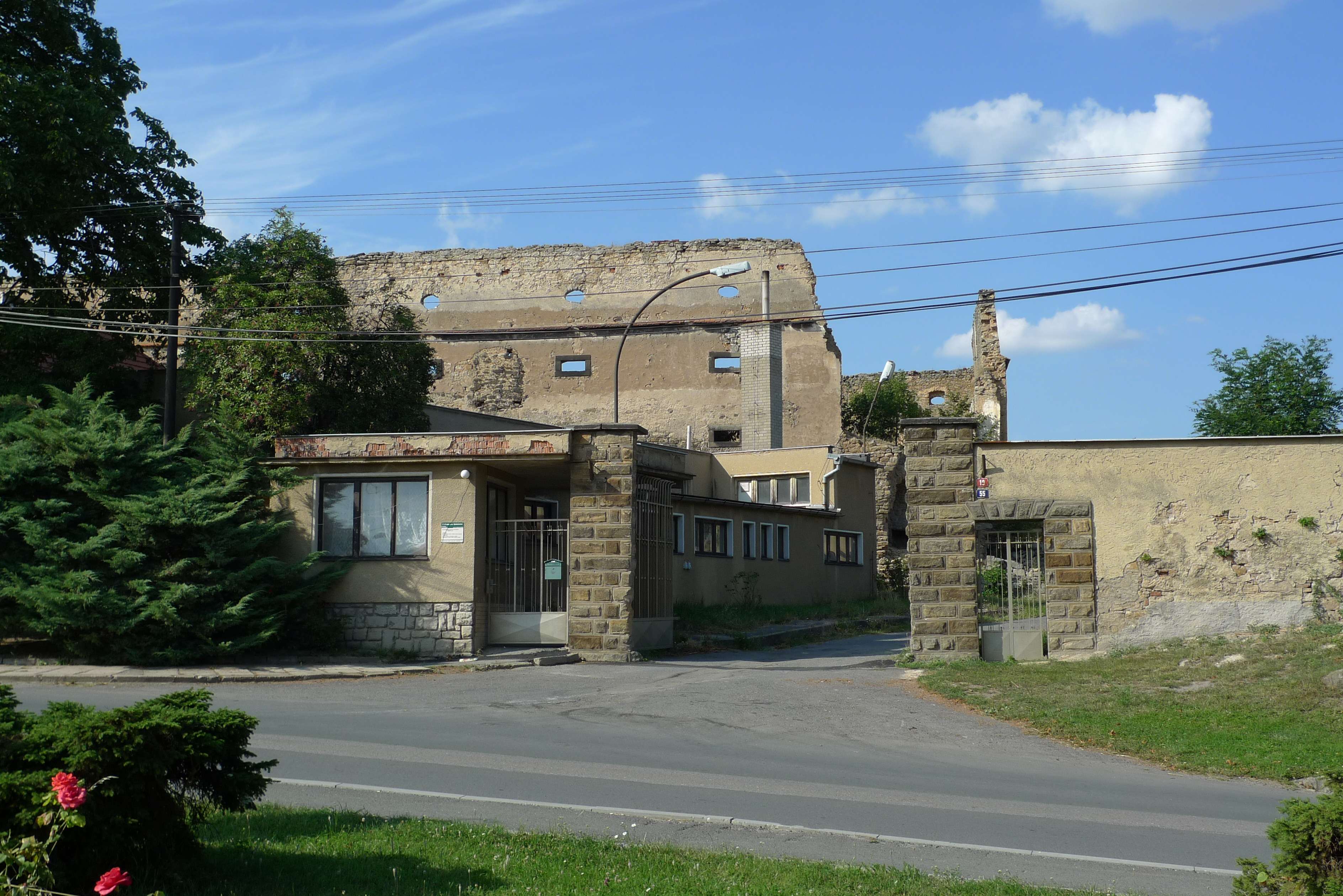 Tvrz v obci Vyšehořovice v okrese Praha-východ.